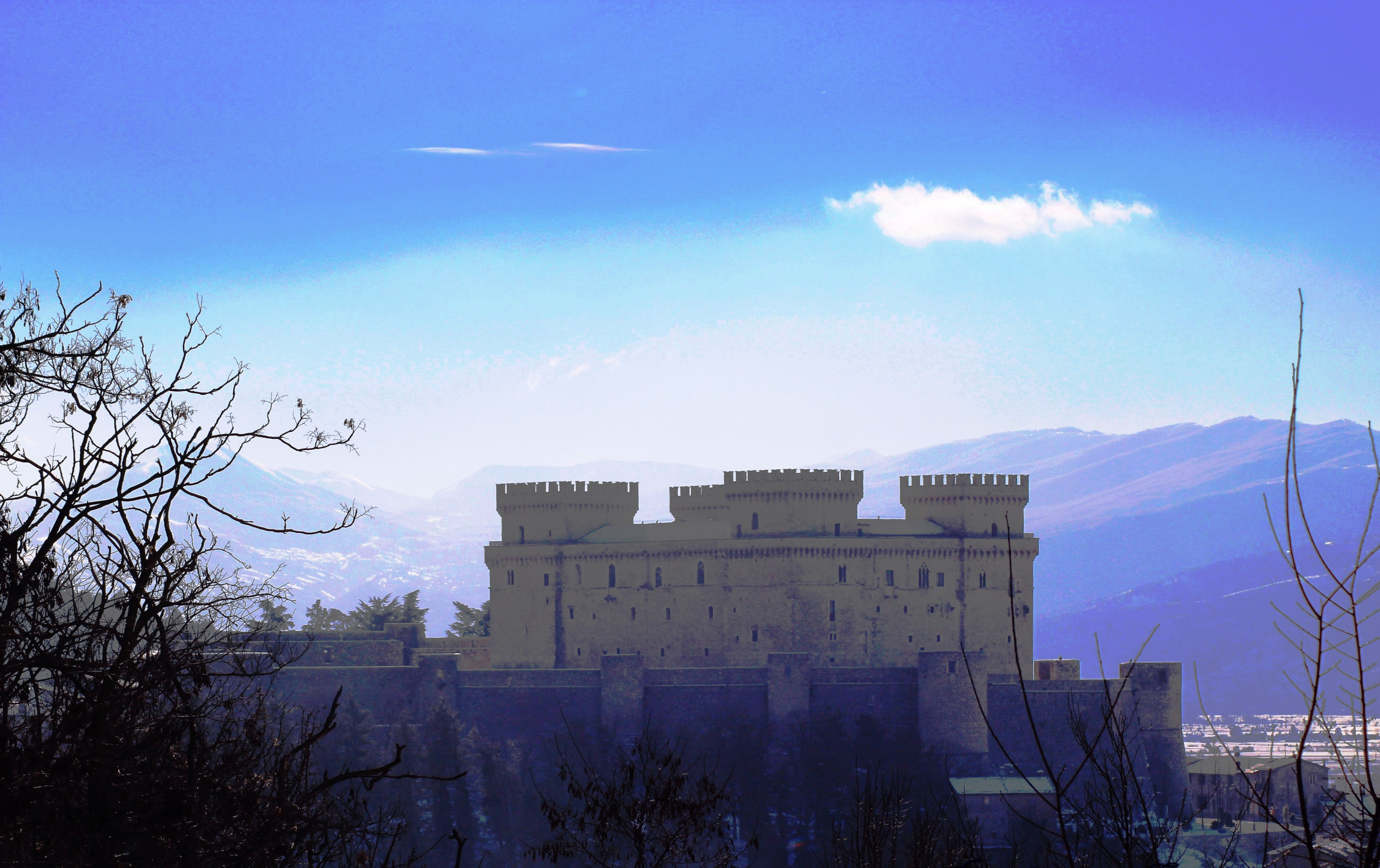 Il castello Piccolomini è sito nel centro storico di Celano dominante la piana del Fucino, nel territorio della Marsica.